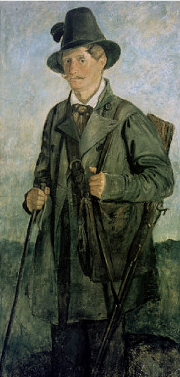 Ölgemälde von Max August von Schilcher in Jägerkleidung